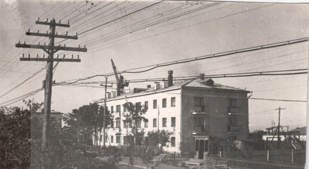 Красногорск, Сахалинская область, ул. Вокзальная, 60-е годы XX века